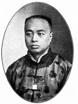 中文（台灣）: 中華民國國會議員